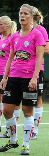 Kopparbergs/Göteborg FC midfielder Sabrina Viguier